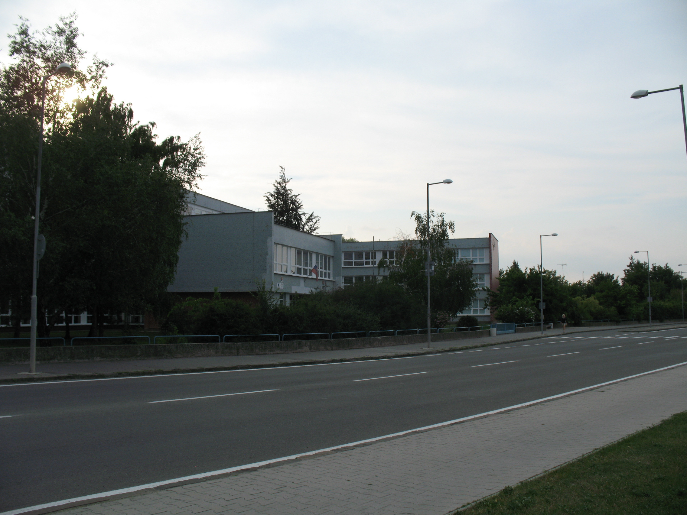 Galánta